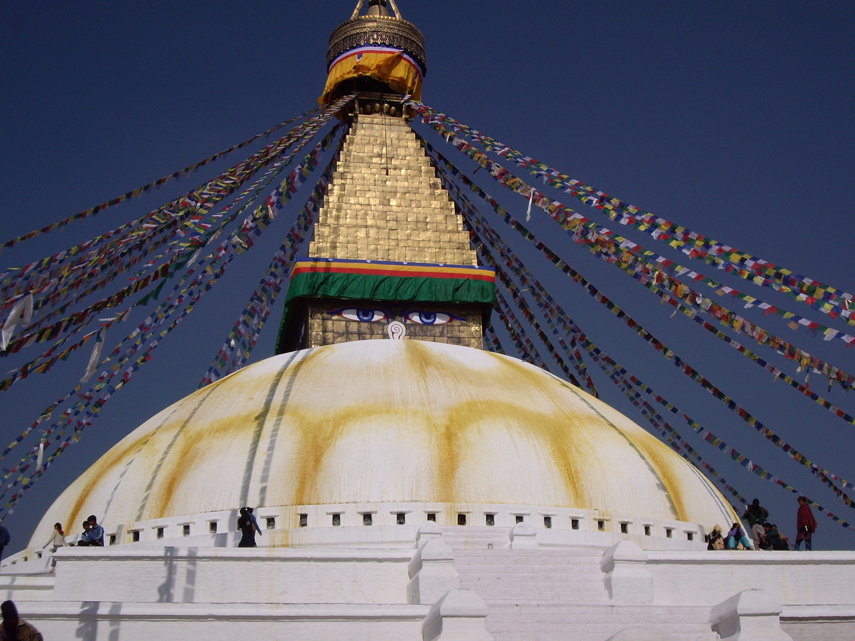 Zelf gemaakte foto door uploader in Kathmandu, de stupa in Bouddah